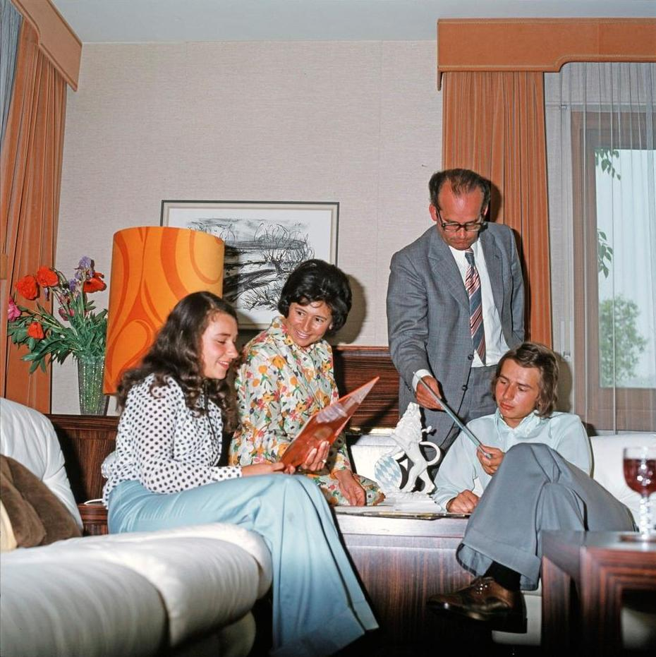 Landeshauptmann Herbert Keßler mit seiner Familie am 12. Juni 1973